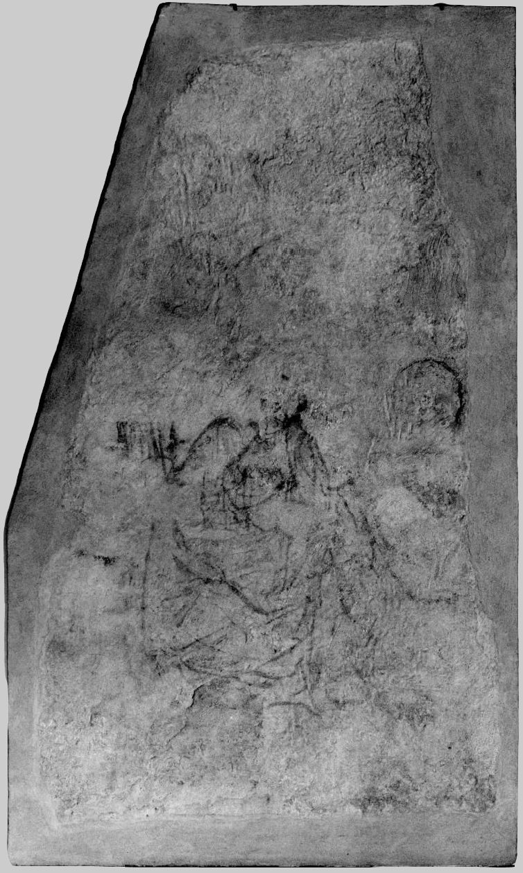 Masaccio, sinopia del pentimento di san pietro, cappella brancacci